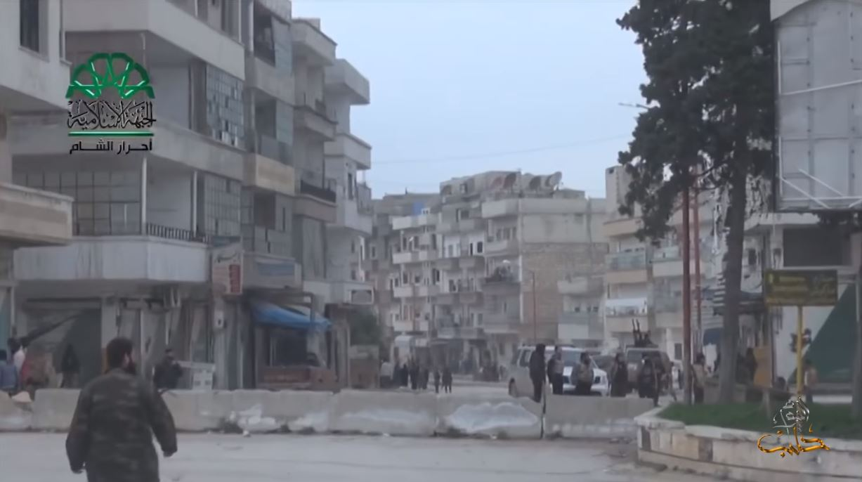 Combattants d'Ahrar al-Cham à l'intérieur de la ville de Jisr al-Choghour en avril ou mai 2015